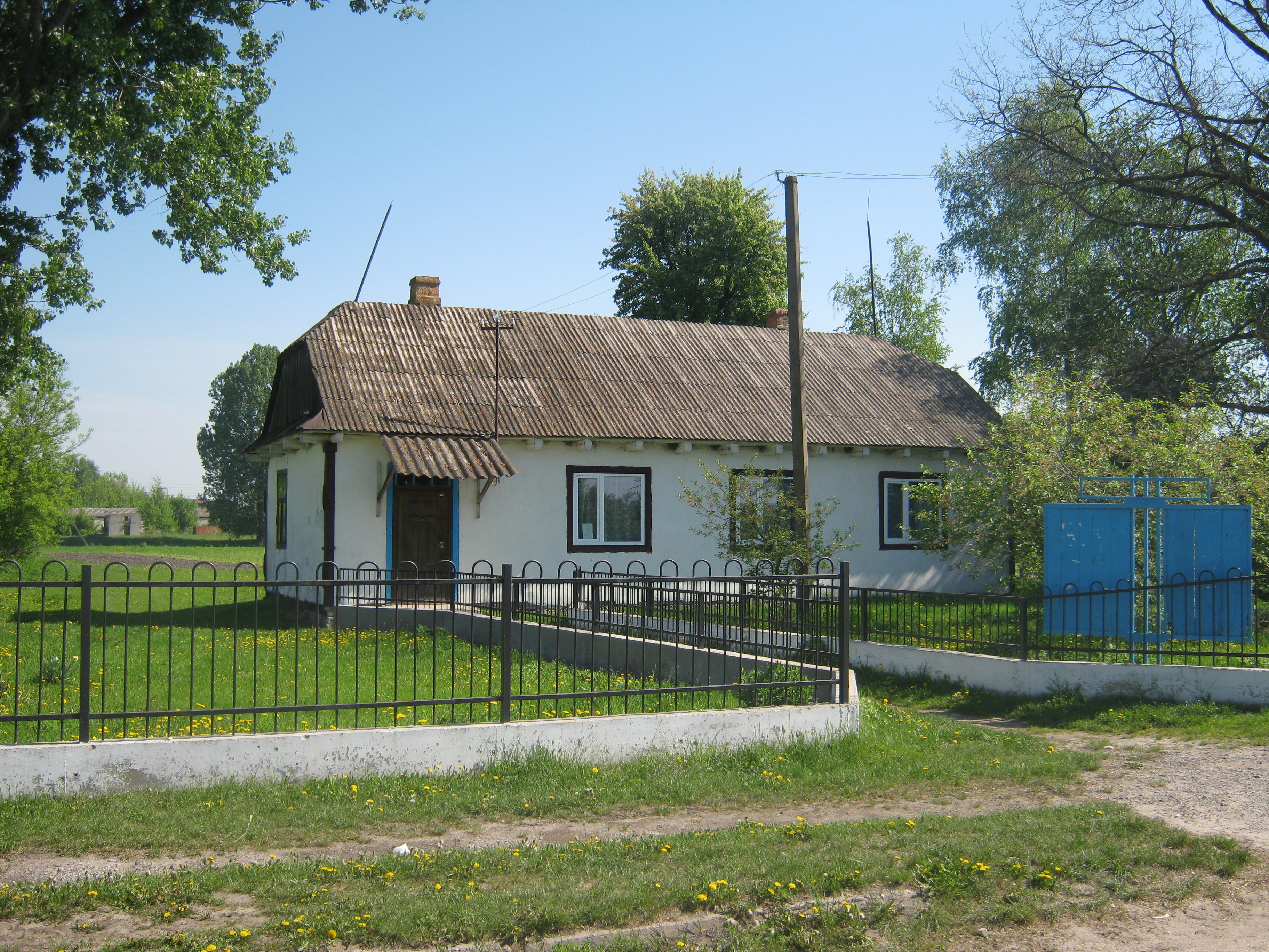 Сільський клуб